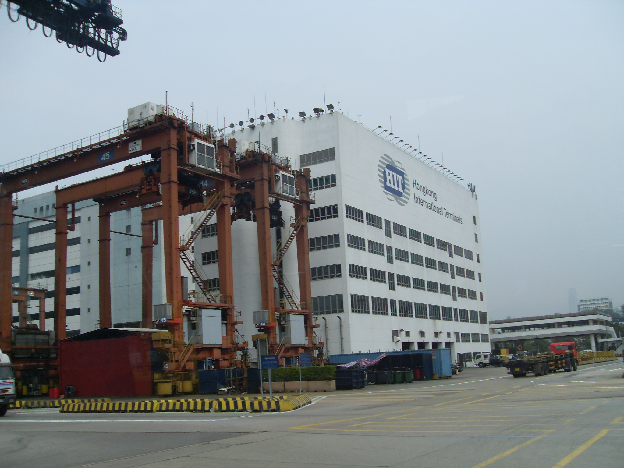 gambar terminal HIT, Hong Kong